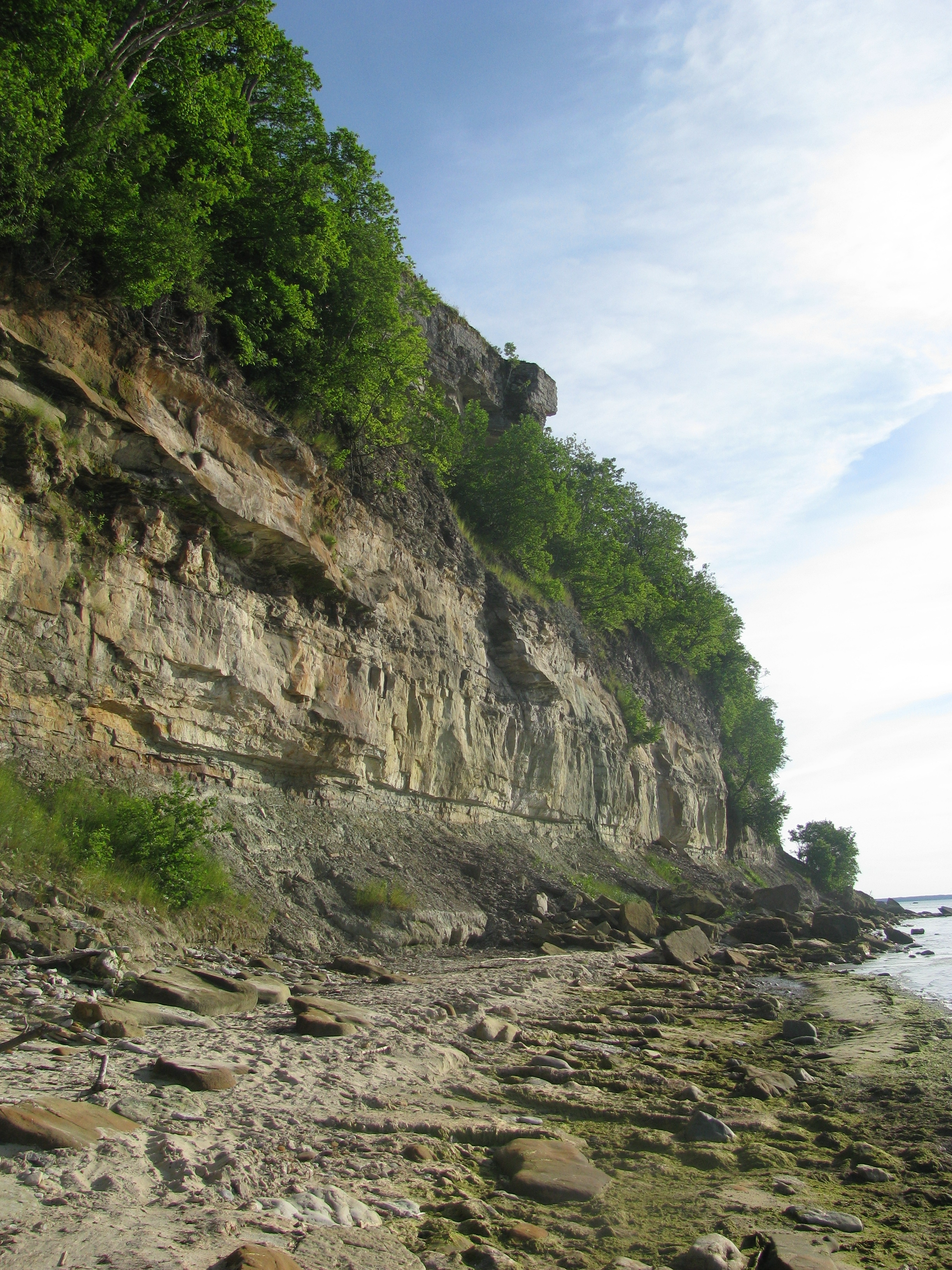 Türisalu pank